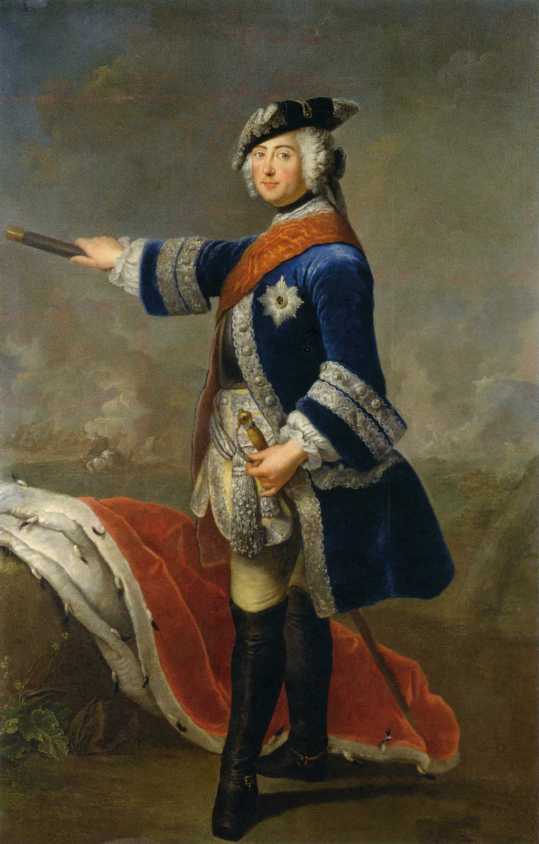 Friedrich II.